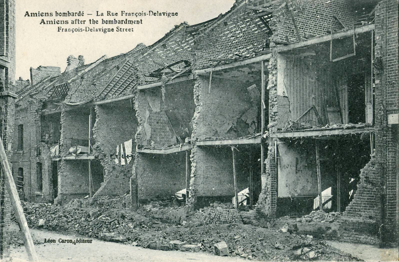 Carte postale ancienne éditée par Léon Caron :AMIENS BOMBARDÉ - La rue François Delavigne